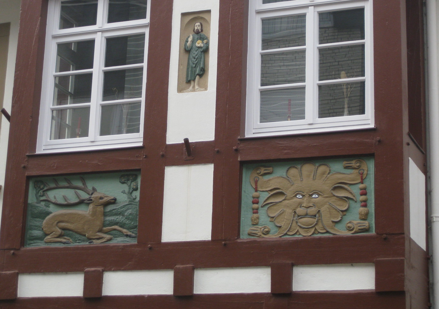 Schnitzarbeiten von Adam Stenelt am Haus Große Straße 6 in Bad Iburg. Die Arbeiten befanden sich ursprünglich an einem Vorgängerbau und wurden hierher versetzt.